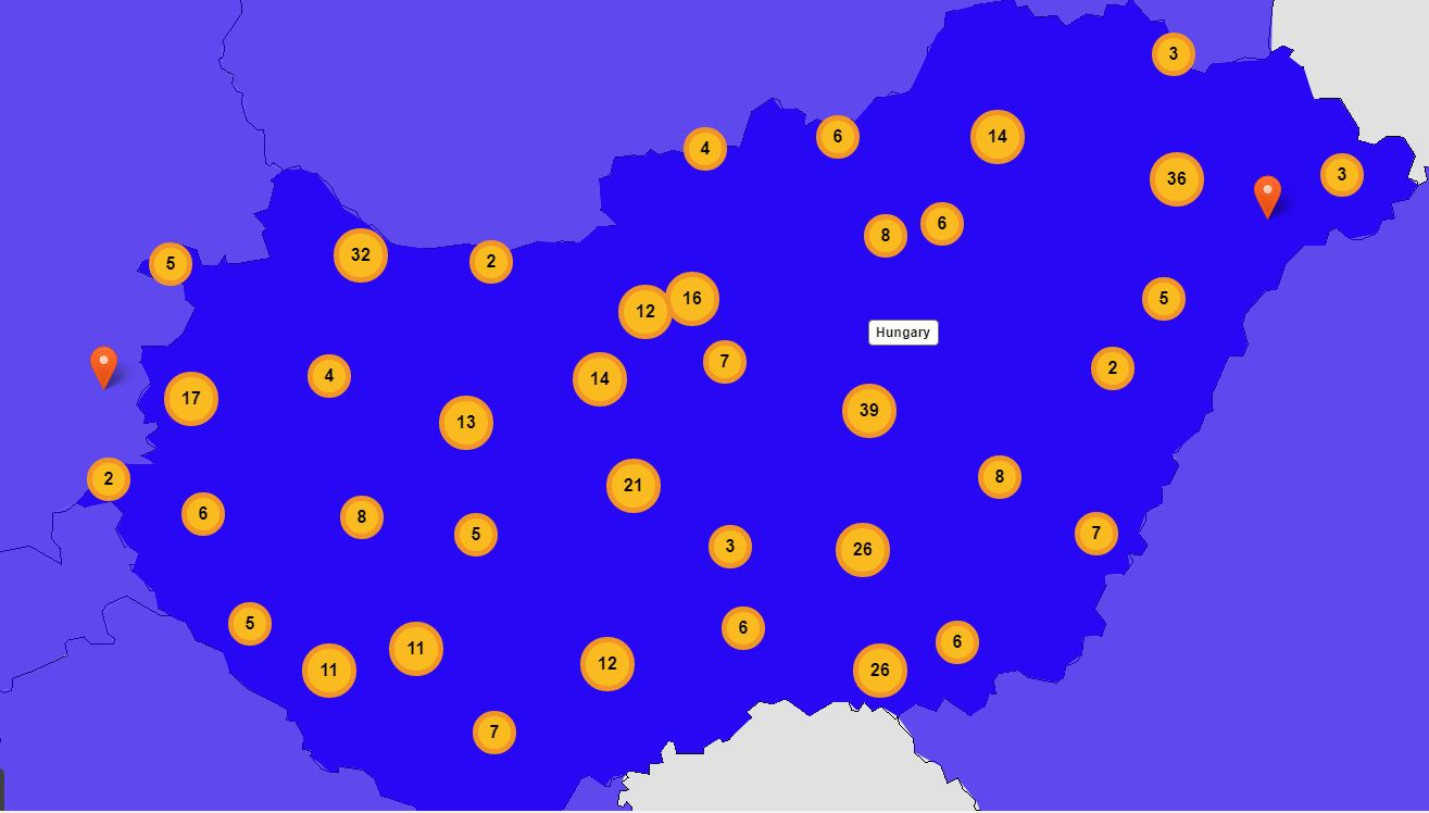 Európai Szakképzési Hét - térkép